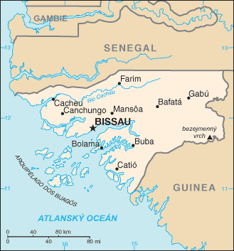 Mapa Guinea-Bissau - přeložená mapa z CIA World Factbook.